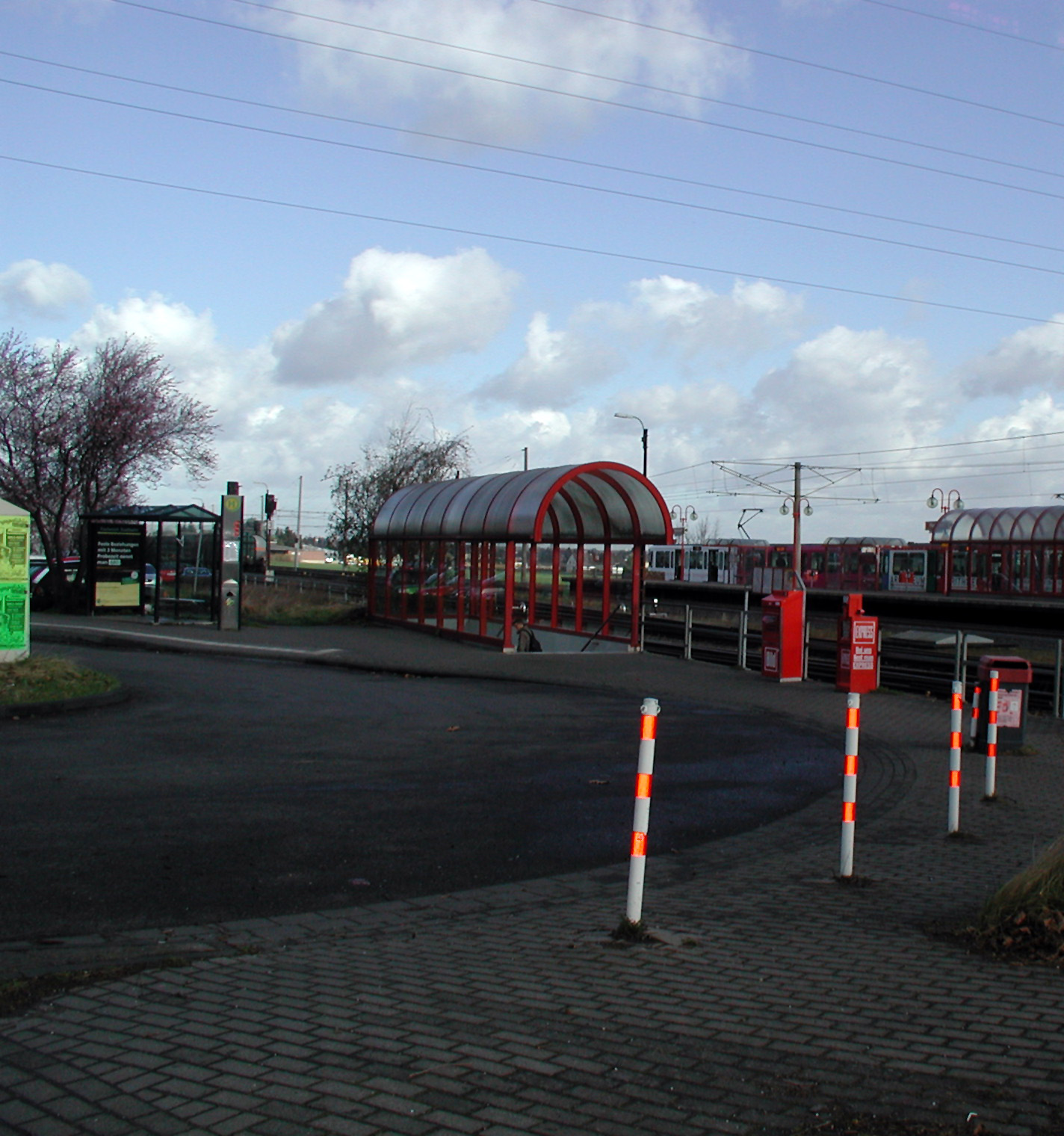 Hürth-Fischenich, Stadtbahn und Busstation